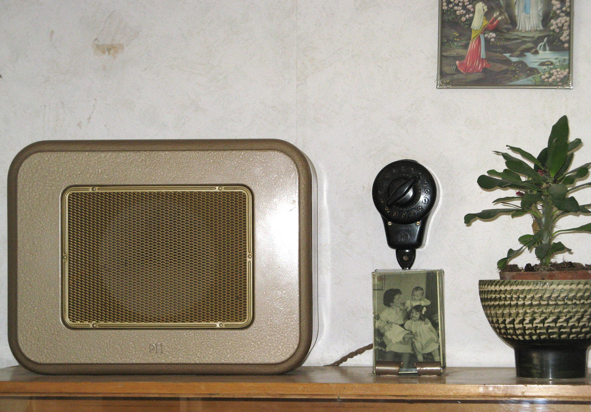 Arbeidershuisjes, Tilburg, 1860, in 1955 naar NOM, thans tijdstraatje 1860-1910-1950-1970, 12.5 194radiodistributie arbeidershuisje(tilburg)